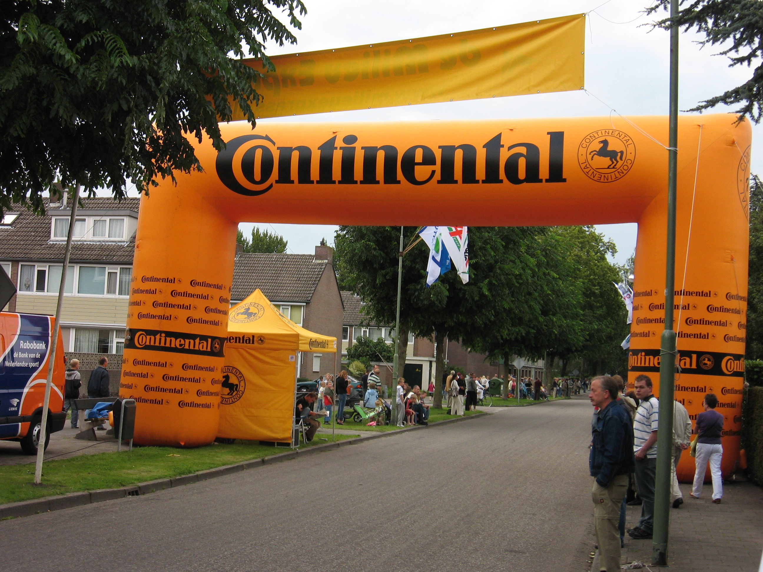 Continental, Pijnacker